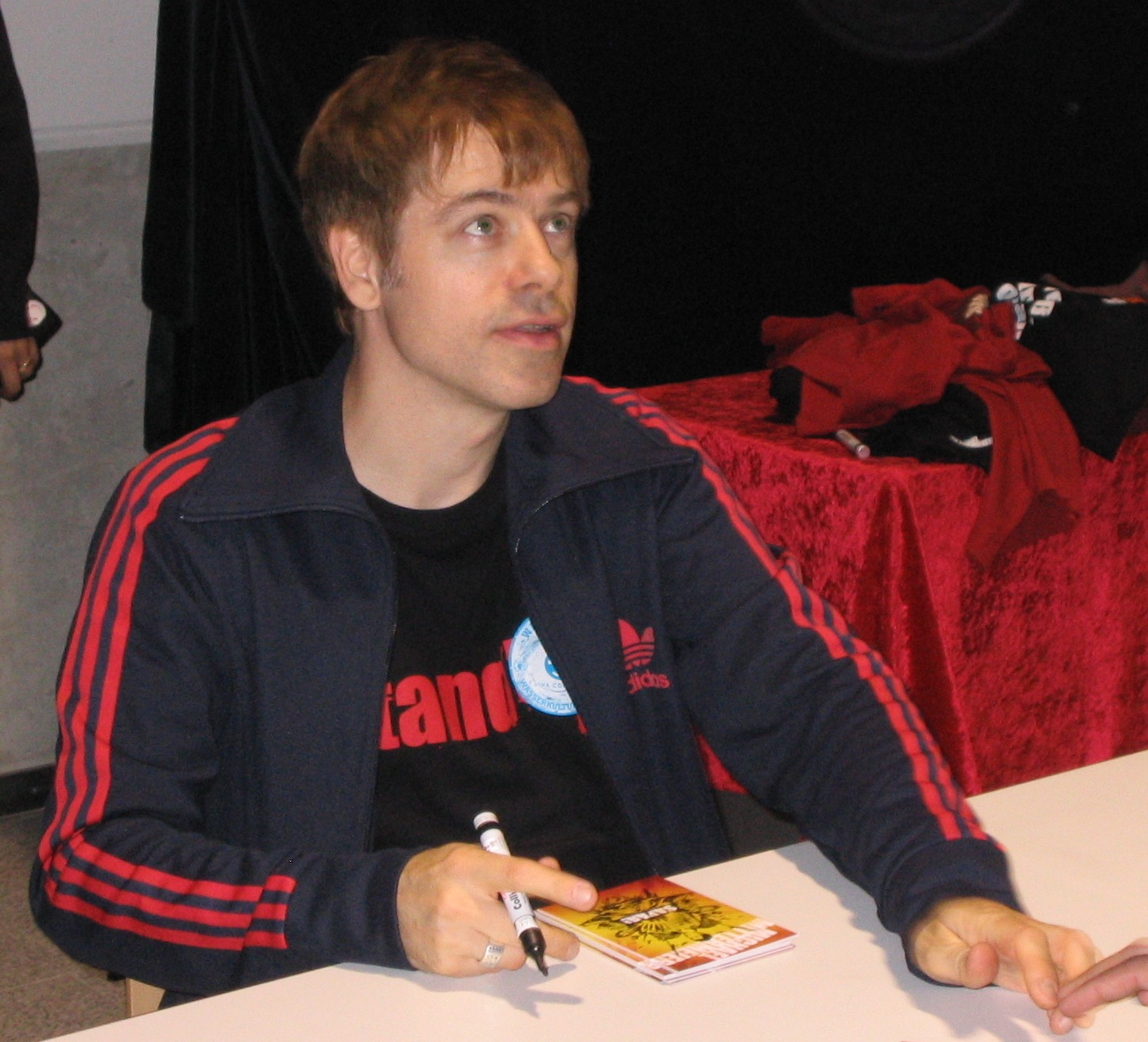 Michael Mittermeier nach seinem Auftritt in der Freiburger Rothaus-Arena